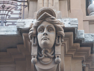 Palazzo del Paciarelli, piazza della Repubblica, Firenze.